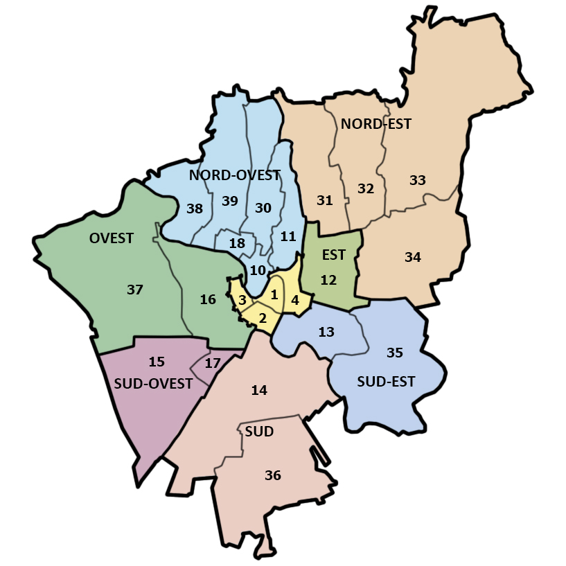 Quartieri e circoscrizioni di Verona Centro storico 1. Città antica 2. Cittadella 3. San Zeno 4. Veronetta Quartieri moderni 10. Borgo Trento 11. Valdonega 12. Borgo Venezia (che comprende Borgo Trieste) 13. Porto San Pancrazio 14. Borgo Roma 15. Santa Lucia 16. Borgo Milano (che comprende le località di Chievo e Saval) 17. Golosine 18. Ponte Crencano Frazioni 30. Avesa 31. Quinto 32. Santa Maria in Stelle 33. Mizzole 34. Montorio 35. San Michele 36. Cadidavid 37. San Massimo 38. Parona 39. Quinzano